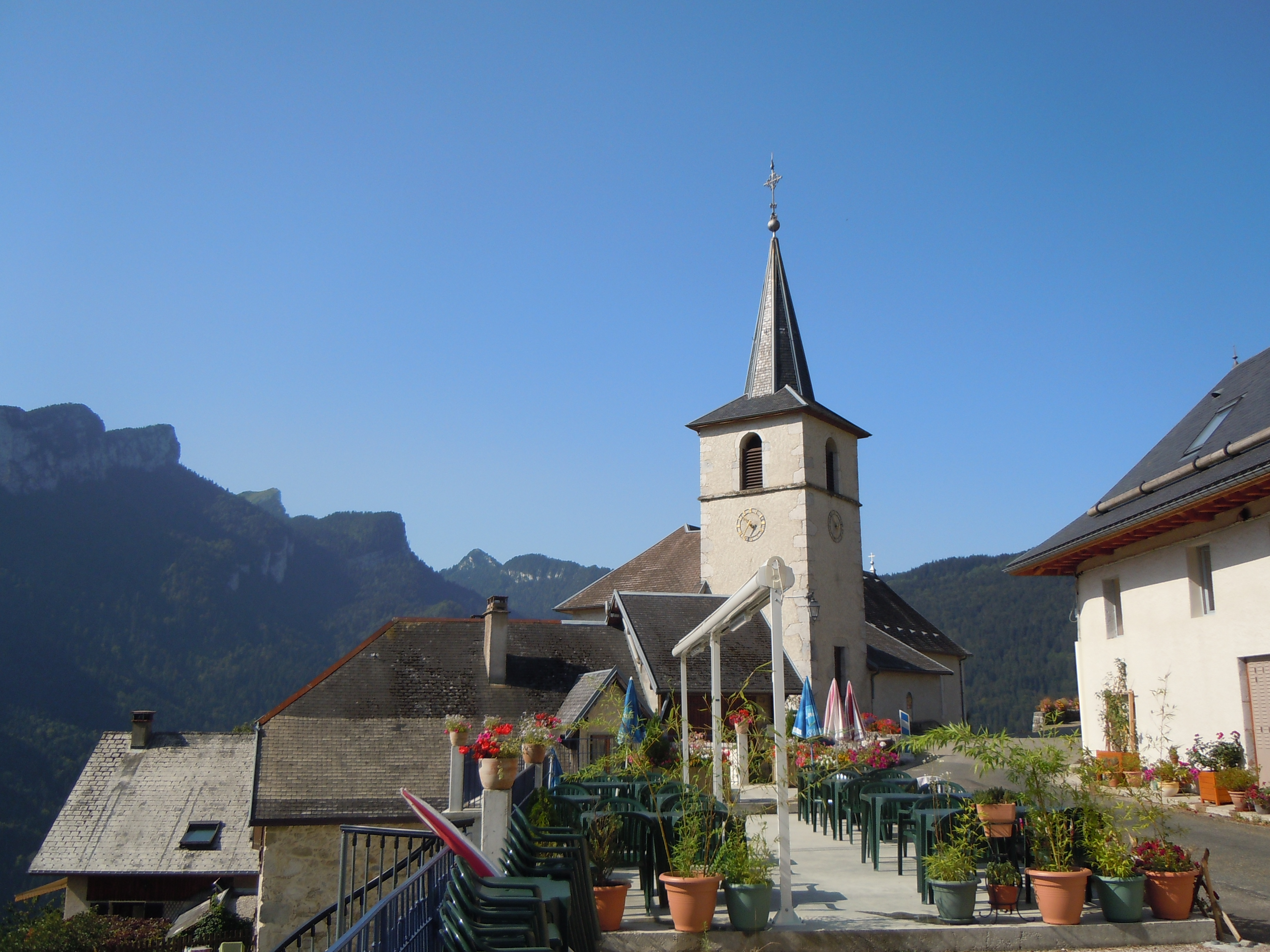 Eglise de Corbel depuis la terrasse du village